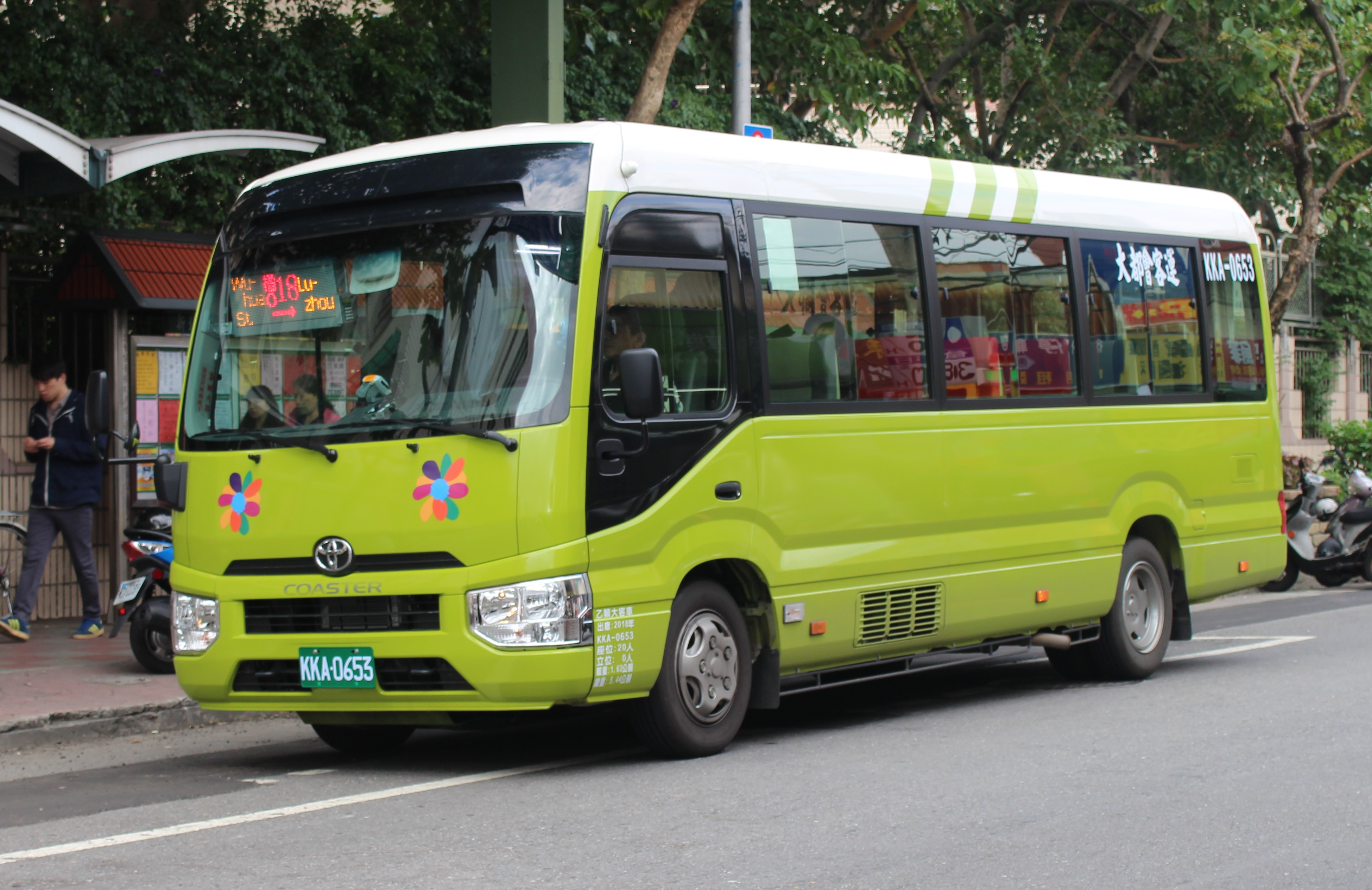 大都會客運2018 TOYOTA COASTER XZB70L-ZEMSYR KKA-0653 橘18